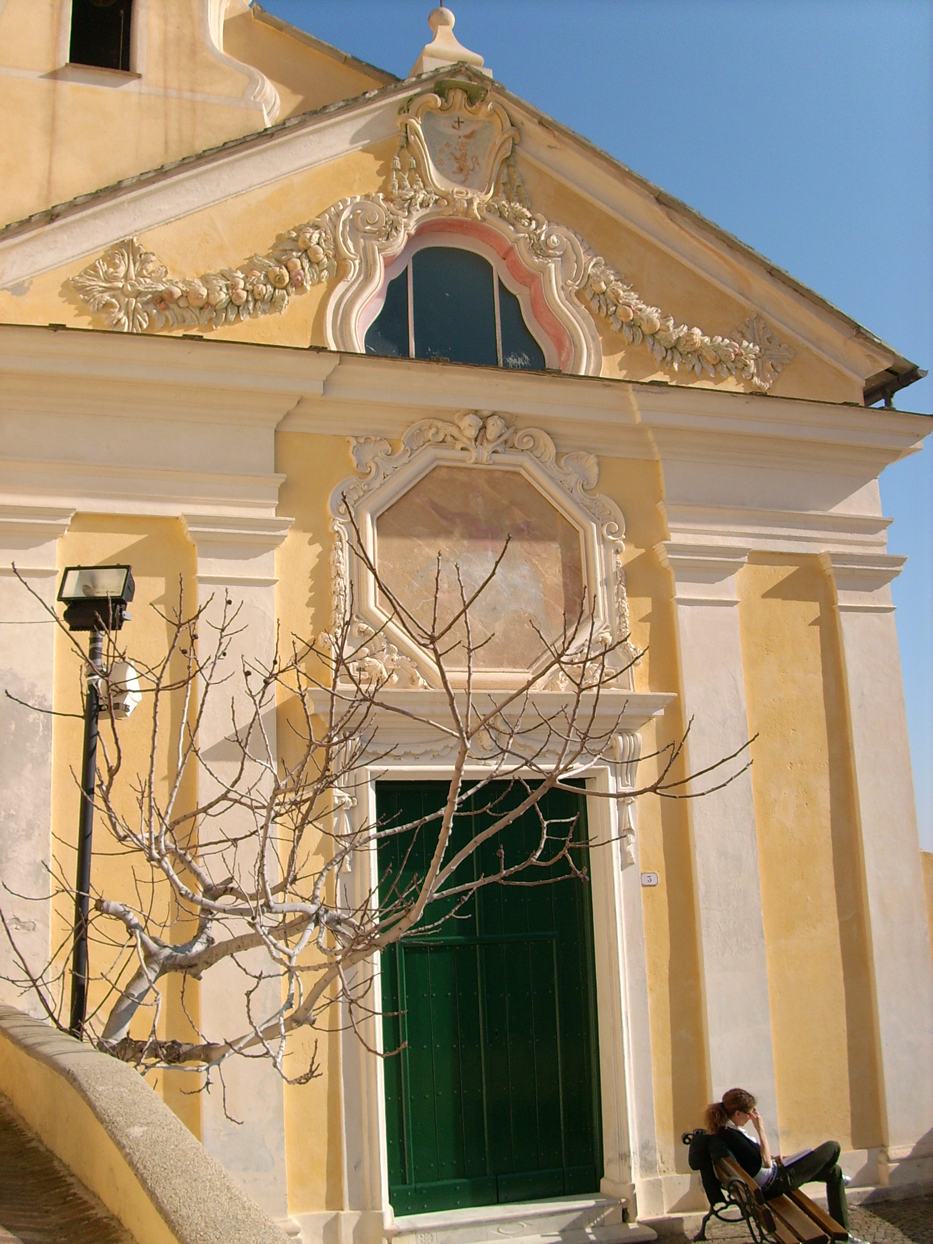 Chiesa di Nostra Signora delle Grazie presso il Palazzo Vescovile di Noli, Liguria, Italy